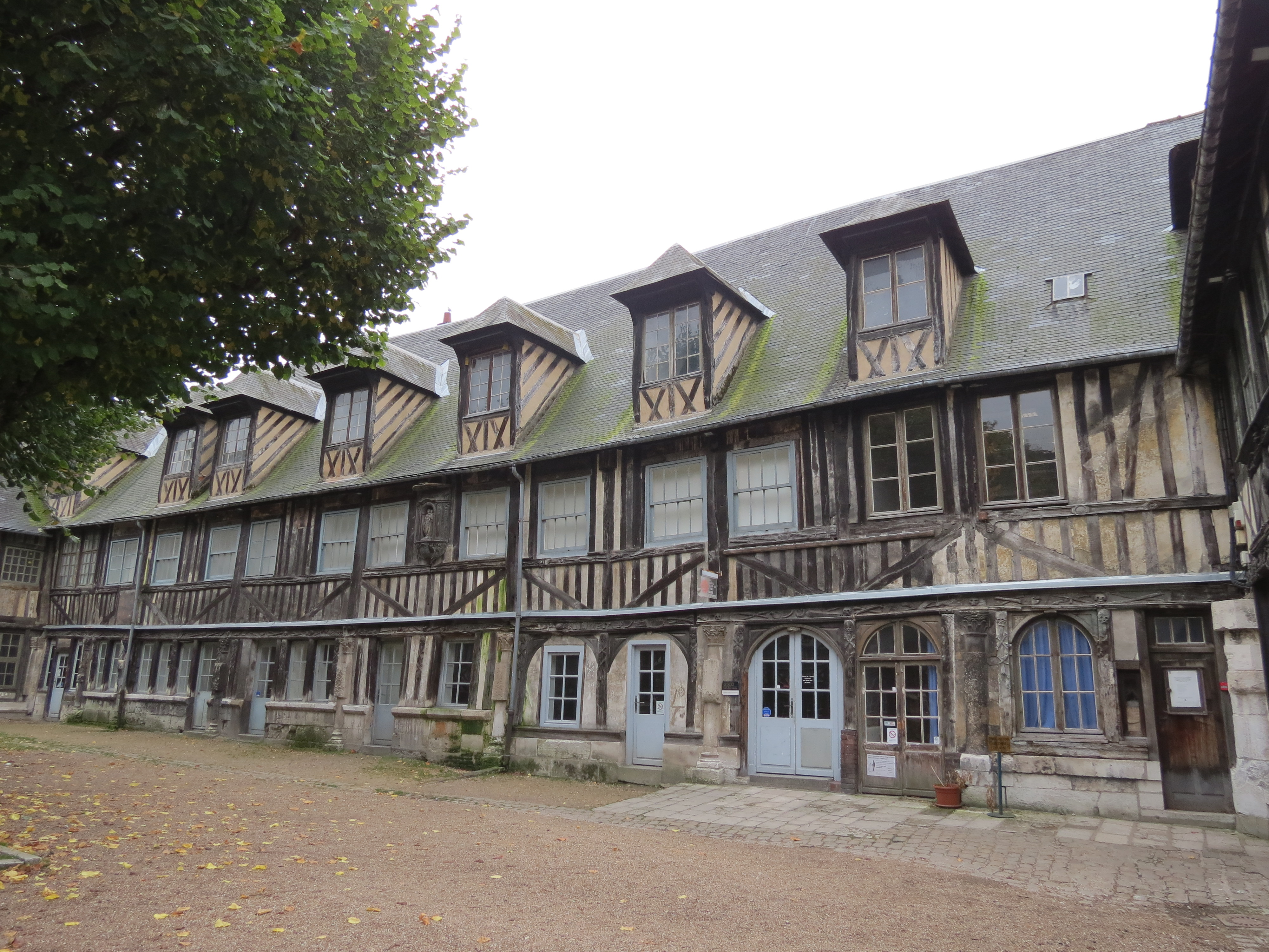 Aître Saint-Maclou